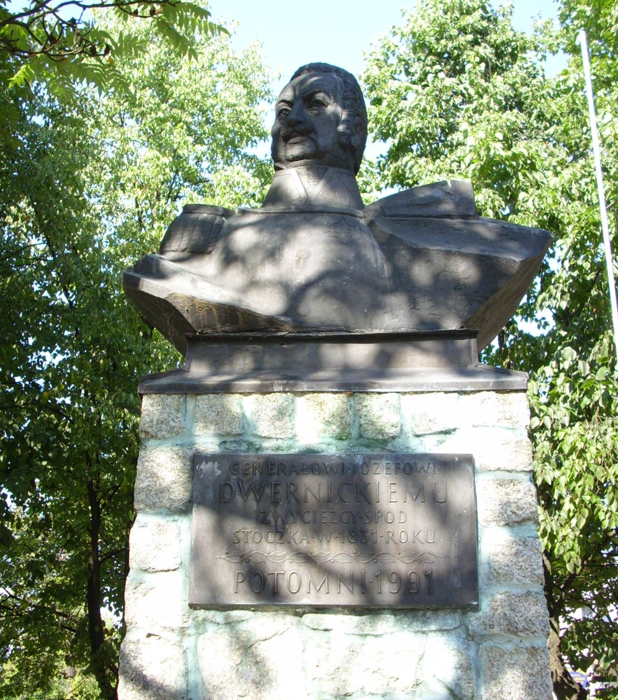 Stoczek Łukowski. Pomnik generała Józefa Dwernickiego w parku na centralnym placu miasta.